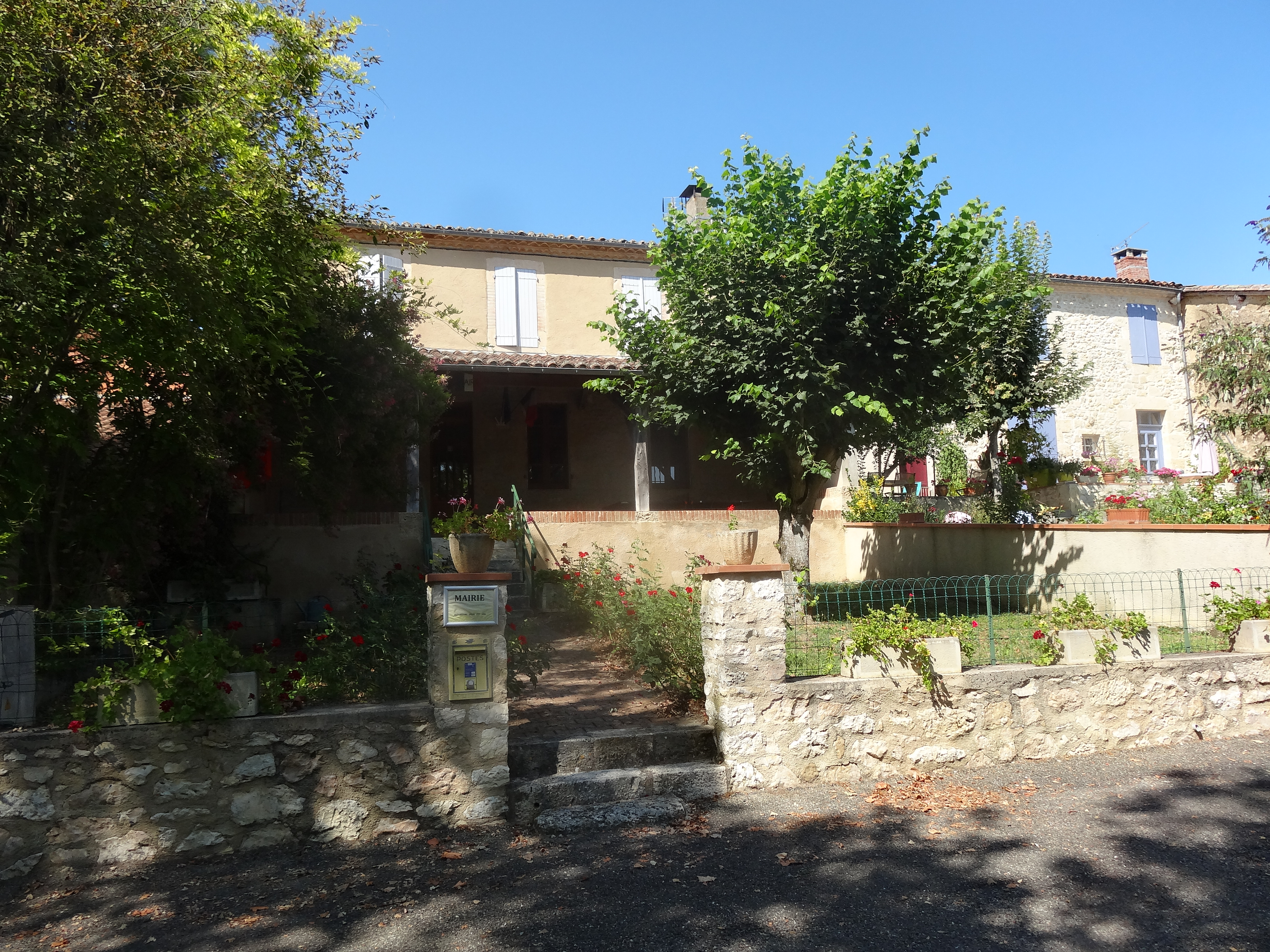 Mairie de Sérempuy.